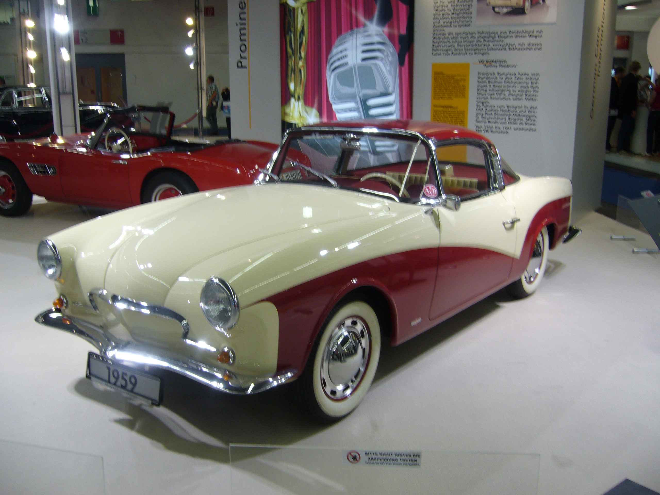 Volkswagen Rometsch Coupe 1959